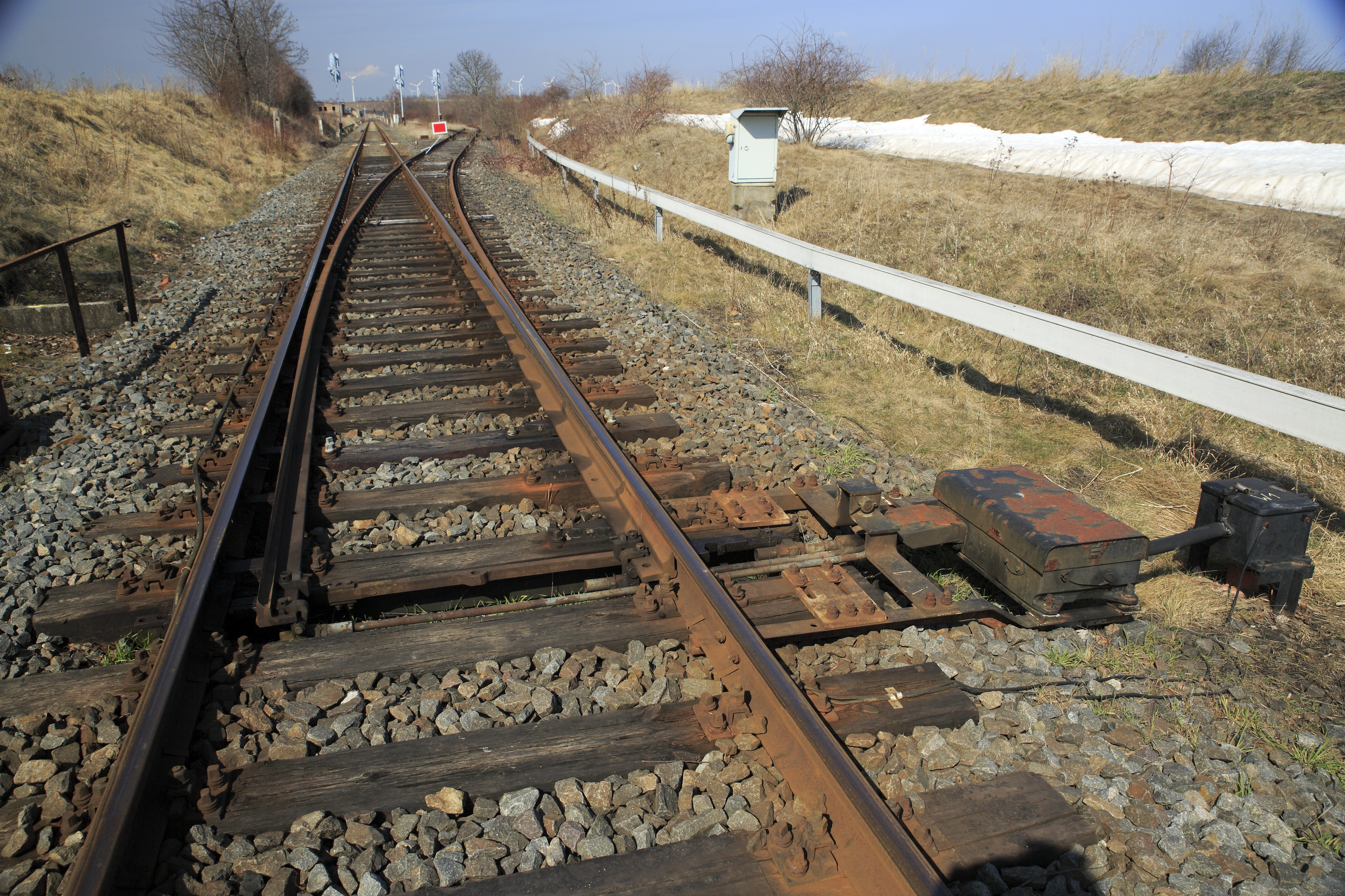 Einfahrweiche von Mücheln, EW 49-300-1:9 fsch. Die Weiche ist wie alle im Bahnhof Langeneichstädt mit einem Klammerspitzenverschluss ausgerüstet, der Weichenantrieb ist deshalb ein Gleissperrenantrieb mit Hubübersetzer von 160 auf 220mm Stellweg. Die ursprünglich verwendeten Innenverschlüsse bewährten sich in Deutschland nicht.